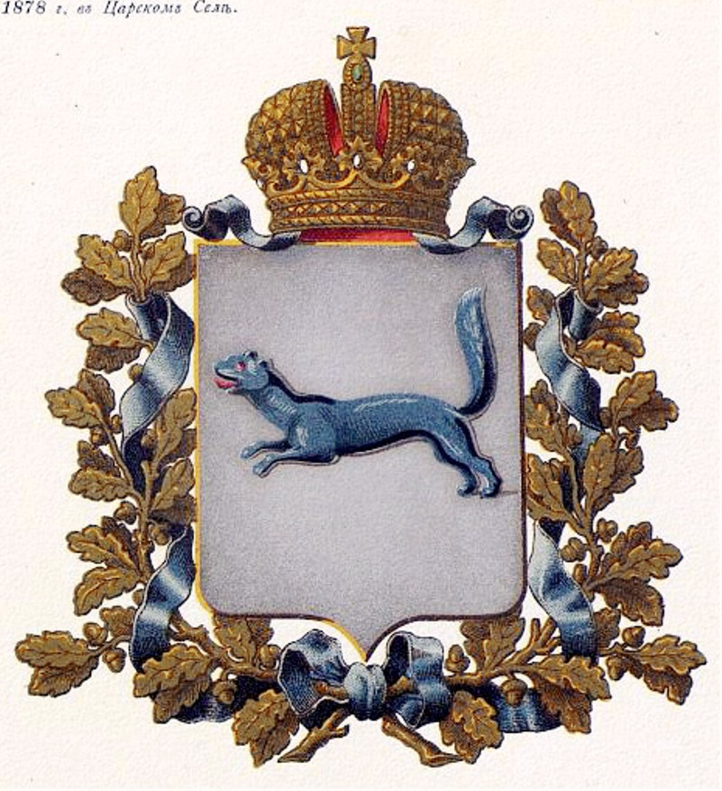 Official Russian Empire coat of arms Ufa Governorate. Герб Российской Империи Уфимской губернии в Гербовнике Министерства внутренних дел Российской Империи издательства Бенке 1880 года. Утверждён Императором Всероссийским Александром Вторым 5 июля 1878 года.